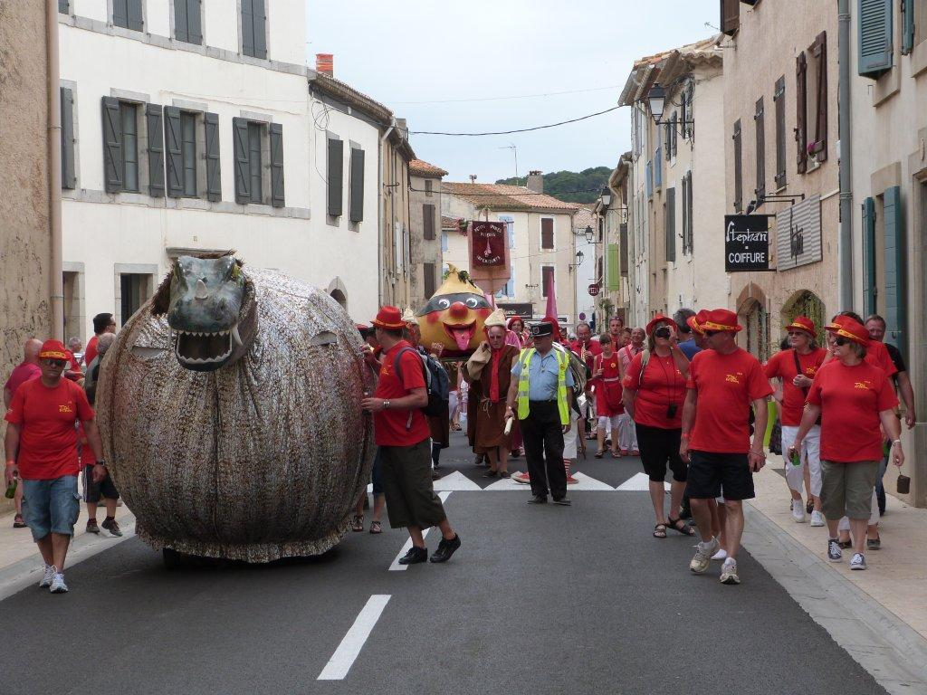 Baragogne - Segonda sortida a Gruissan